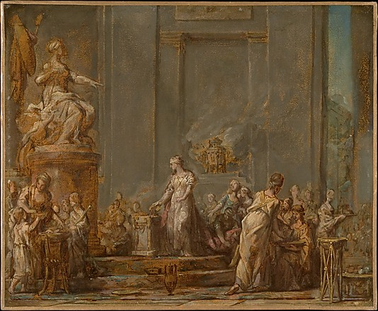 Dido's Sacrifice to Juno